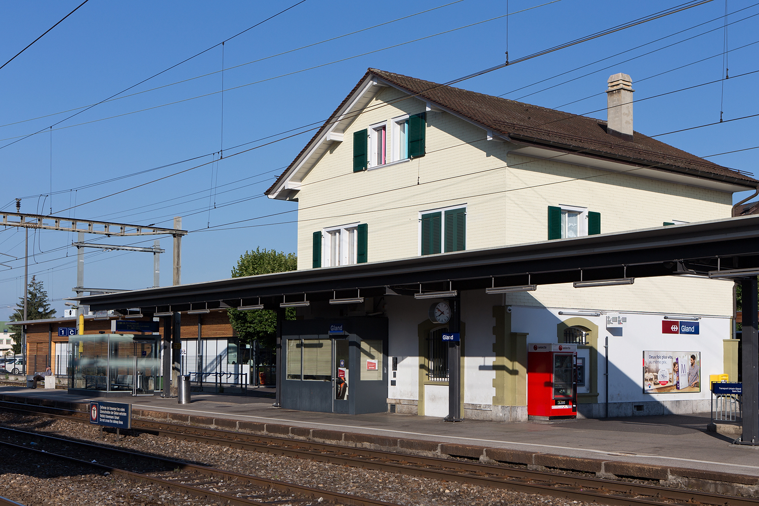 Der Bahnhof in Gland